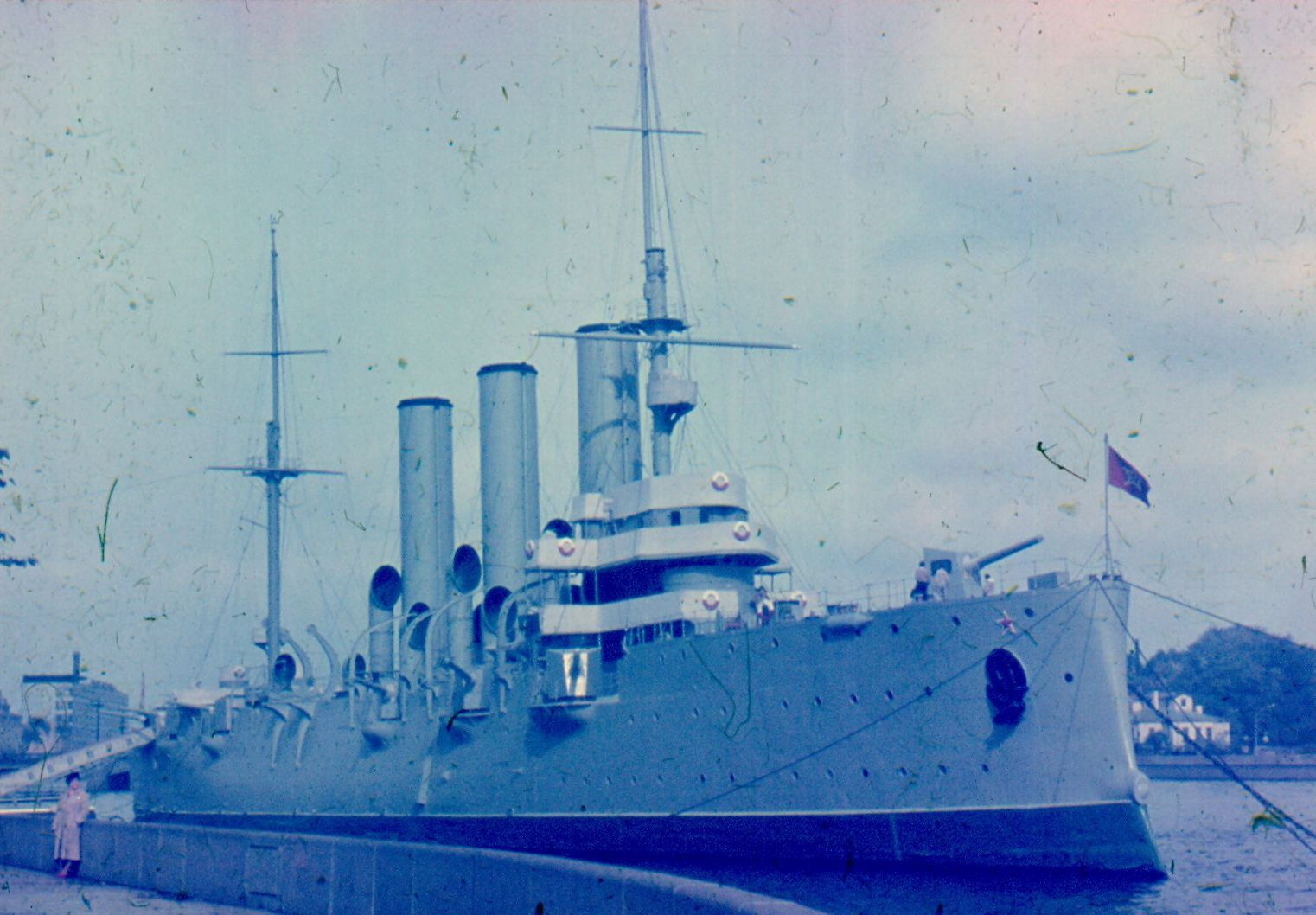 Крейсер Аврора в сентябре 1983 года